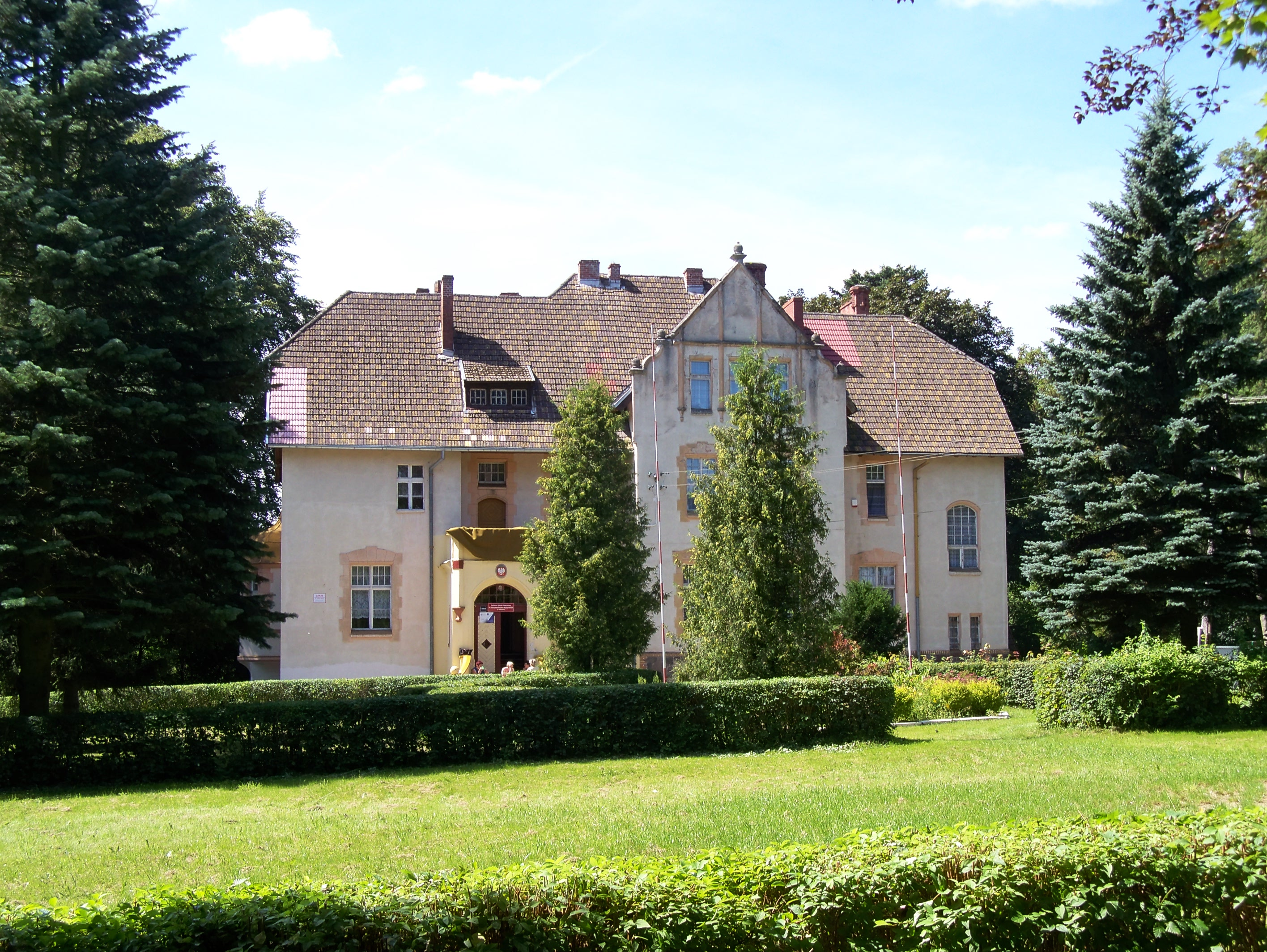 Pałac w Bolkowie.